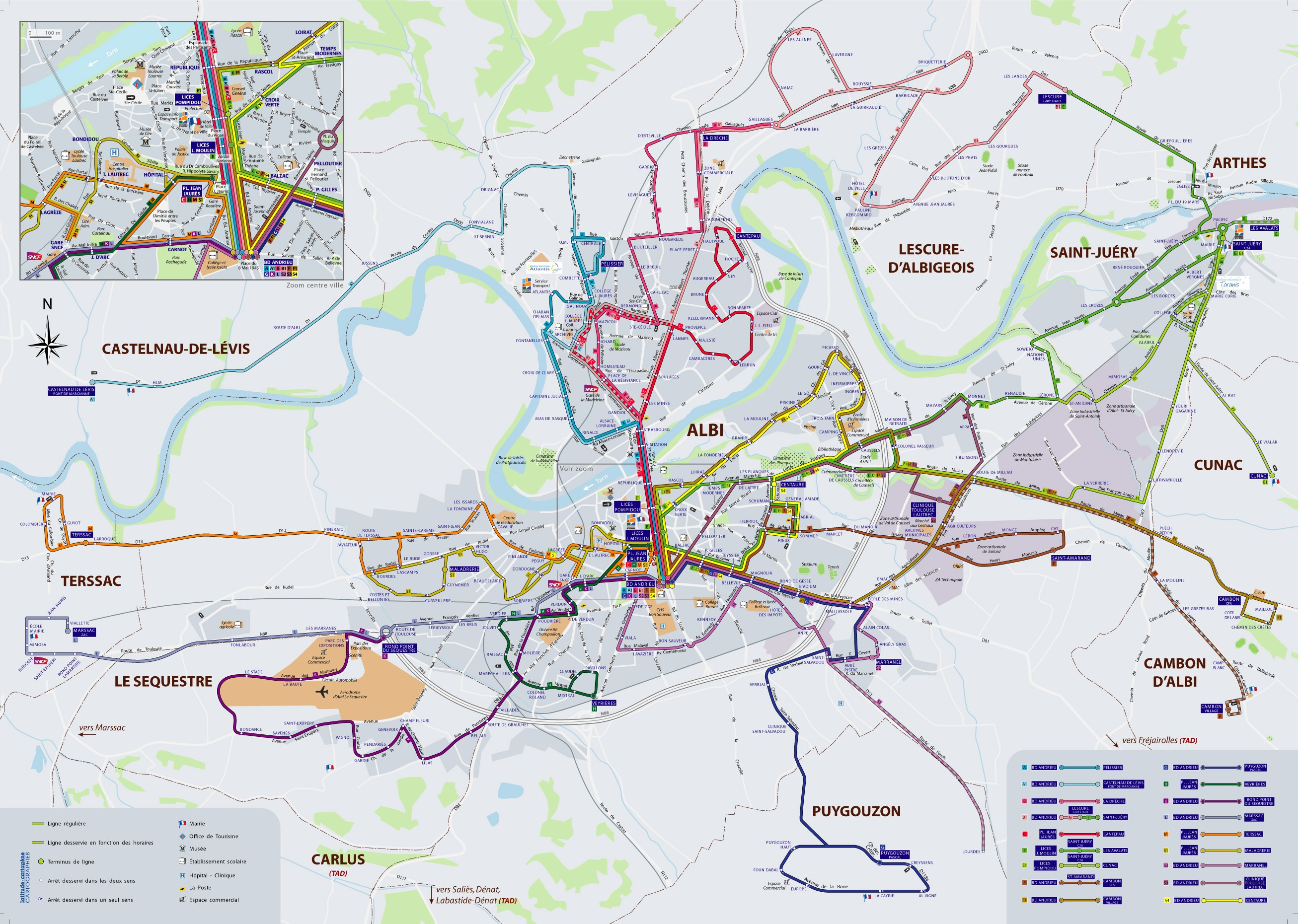 Plan du Réseau Albibus